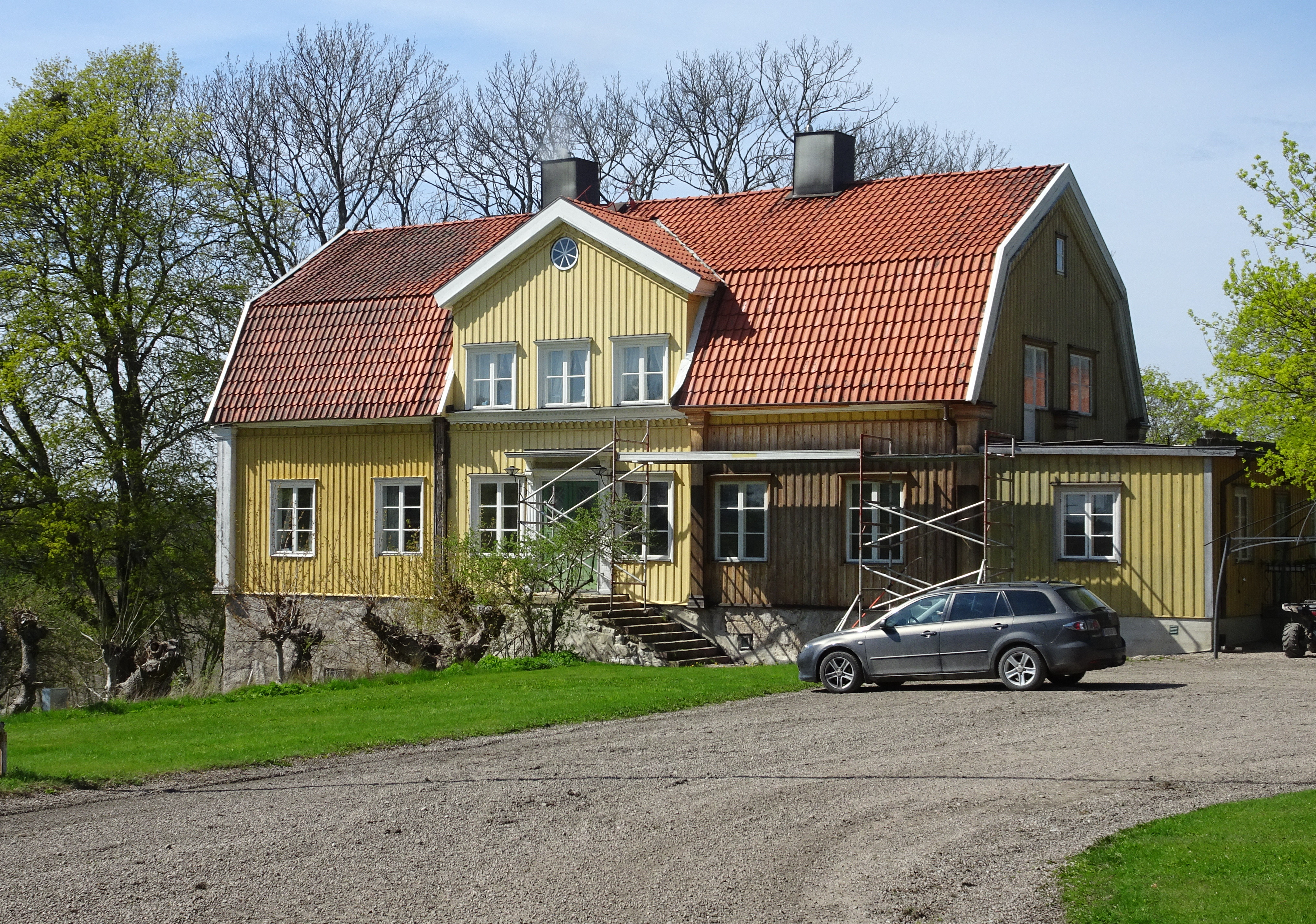 Lagnö gård, huvudbyggnad